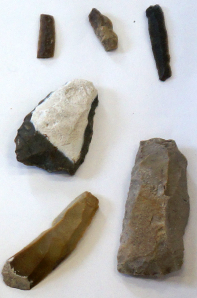 présentées au Musée archéologique de Pons.